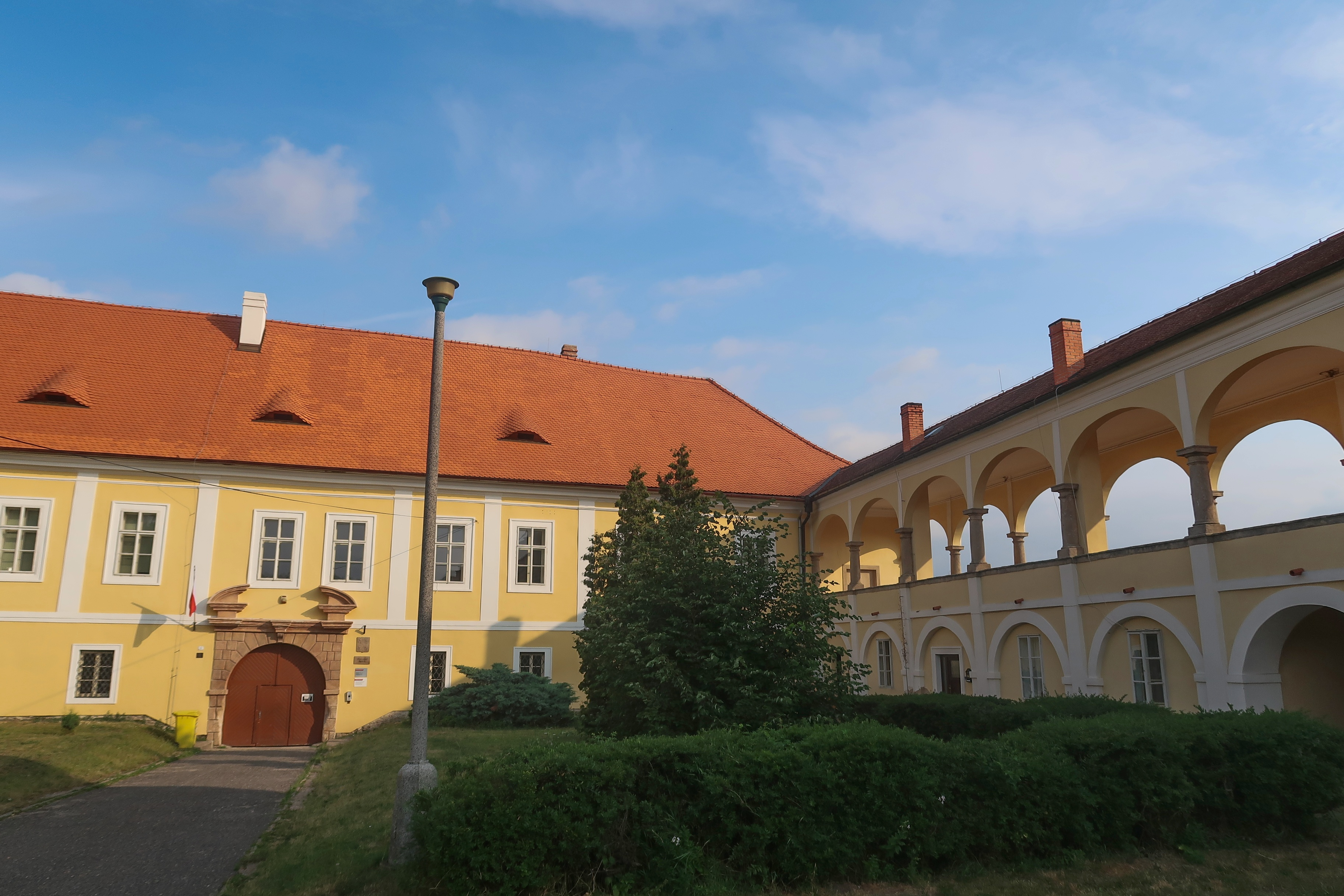 Vstupní průčelí s arkádovou chodbou spojující zámek s kostelem sv. Martina